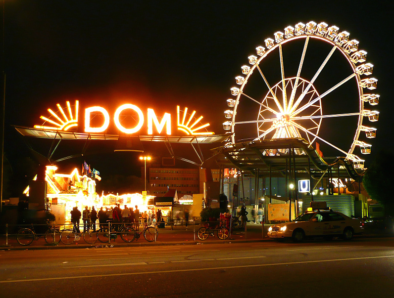 Hamburger Dom